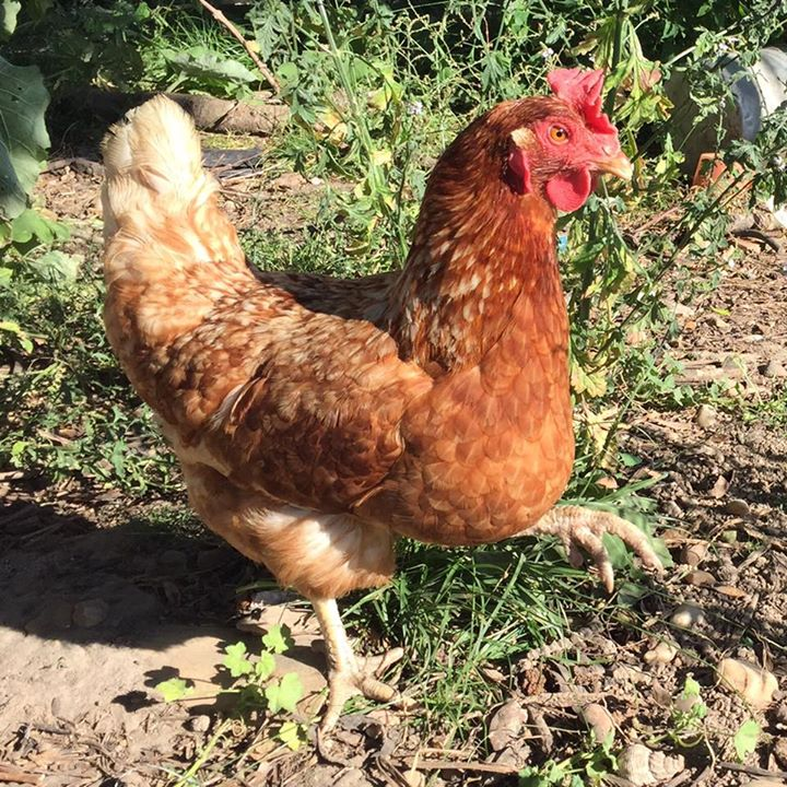 Poule Lohmann Brown de 24 mois